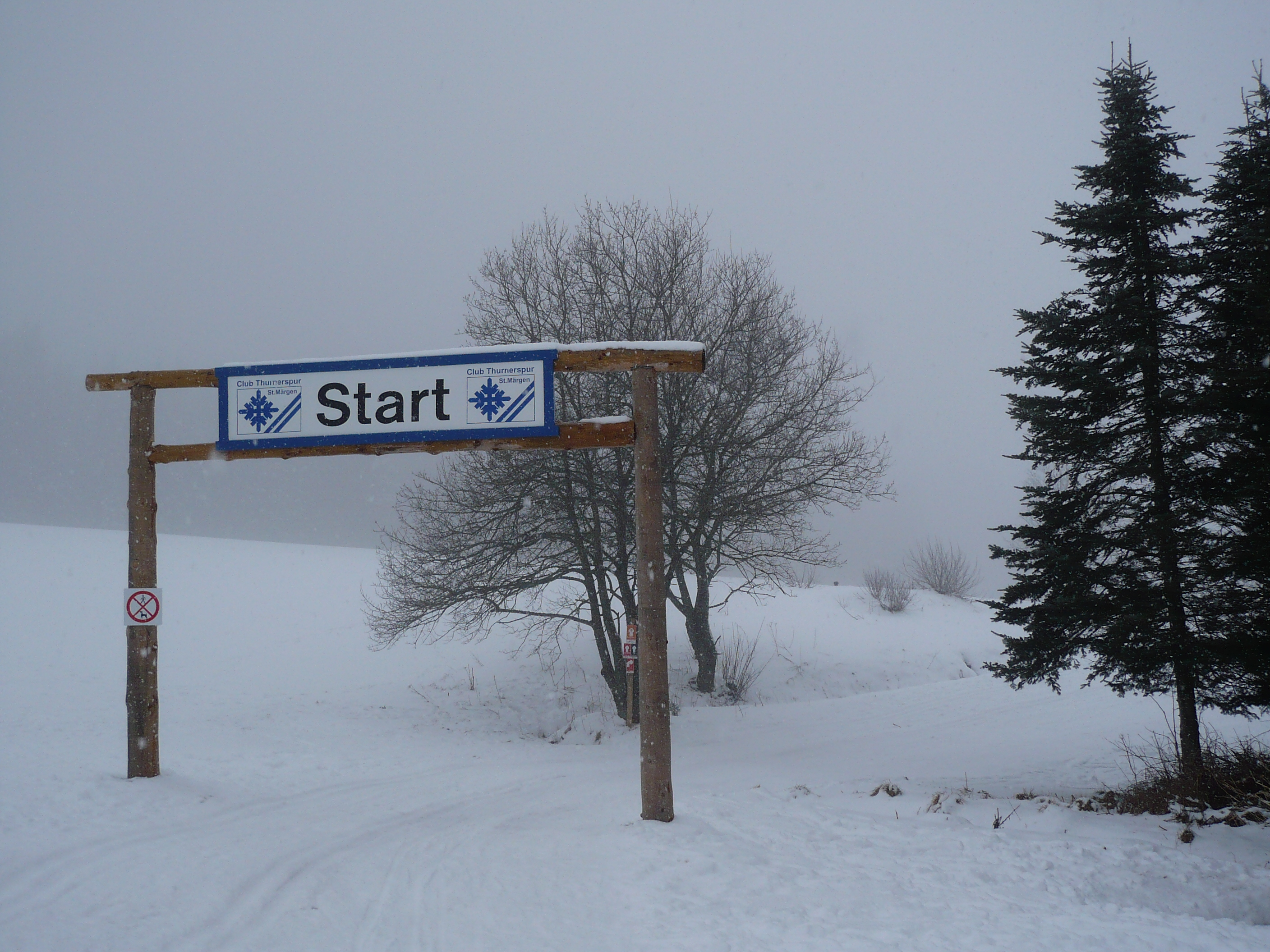 Start Thurnerspur